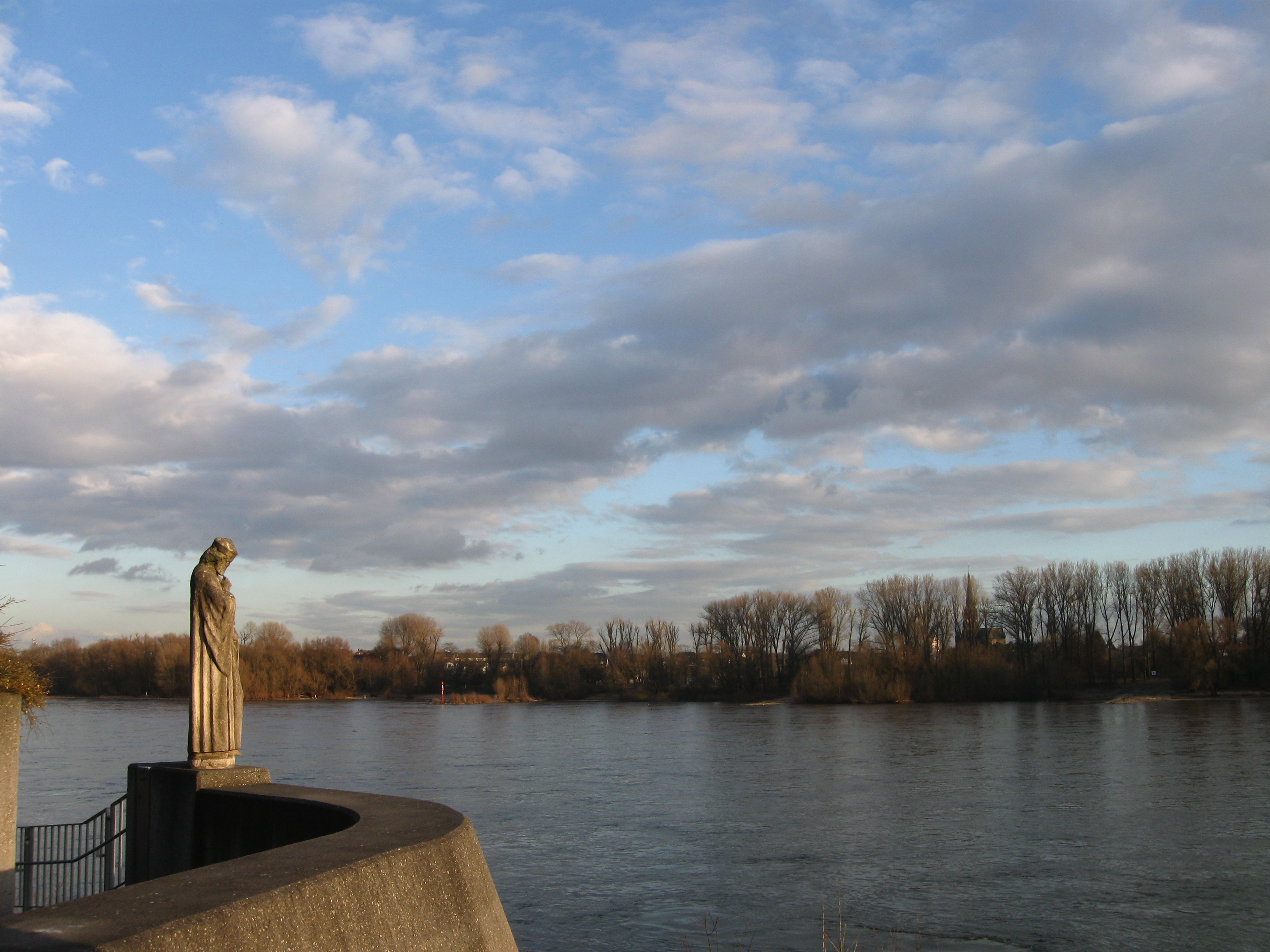 Weißer Rheinbogen: Blick stromabwärts über das Schwaadeck mit der Nepomukfigur vom Kölner Dom von Christian Mohr (geschaffen 1869/70). Die Figur gehörte ursprünglich zum Fassadenschmuck der Südquerhausfassade des Domes (rechtes Seitenportal, vordere Reihe, äußerste Figur links) und wurde nach leichter Kriegsbeschädigung 1945/46 entsorgt und von dem Bildhauer Elmar Hillebrand in Köln-Weiß verwahrt. An der Domfassade wurde die Figur später durch eine Kopie ersetzt. Hillebrand stiftete die Figur 1978 der Dorfgemeinschaft und ließ sie auf dem neu gestalteten Schwaadeck in der Nähe des Weißer Kapellchens mit Blick auf den Rhein aufstellen. Literatur: Peter Pies (Hrsg.): Die Gemeinde Weiß, nun Stadtteil von Köln. Band 4. Rheinlandia Verlag Klaus Walterscheid, Siegburg 2015, S. 17–20.